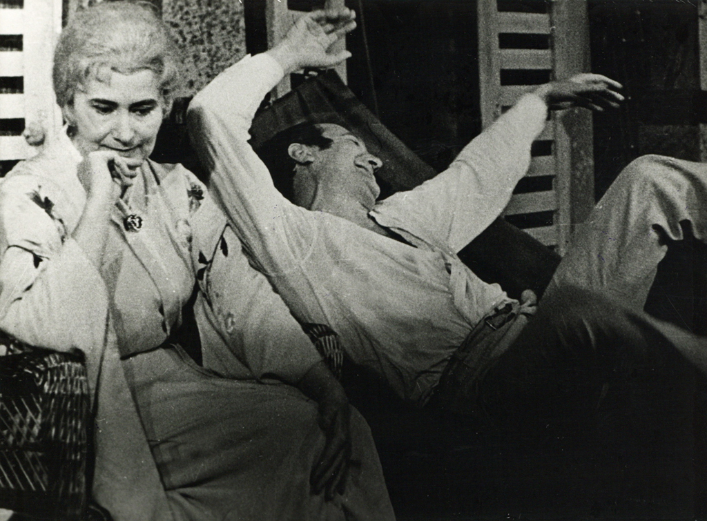 Tennessee Williams, Noč iguane, SNG v Mariboru. Na fotografiji: Angelca Jenčič Janko (Hannah Jelkes), Anton Petje (Laurence Shannon).